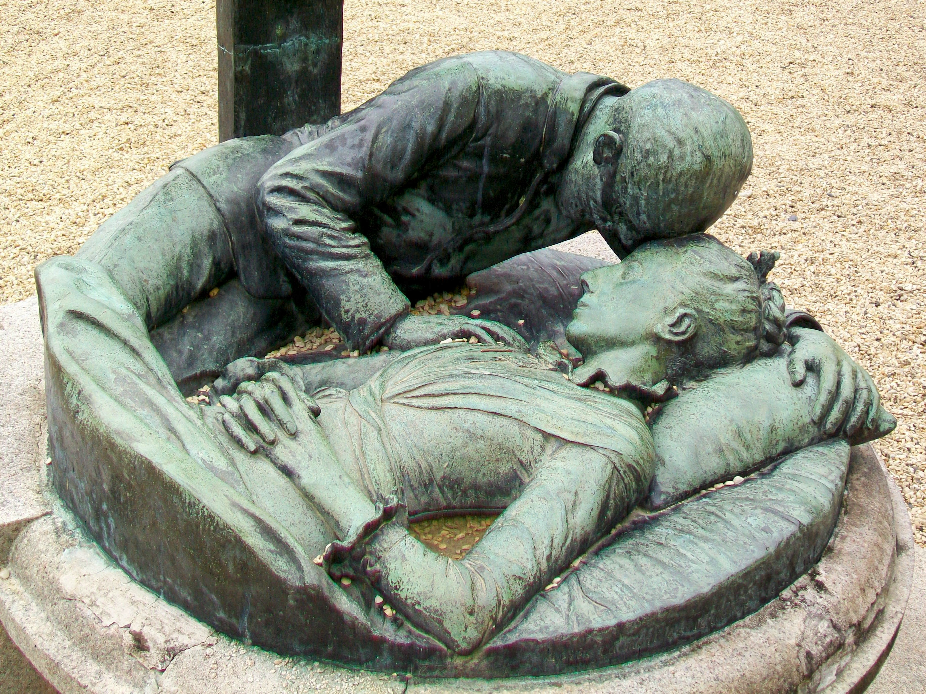 Détail du monument aux morts du hameau de Bouillant, devant l'église.